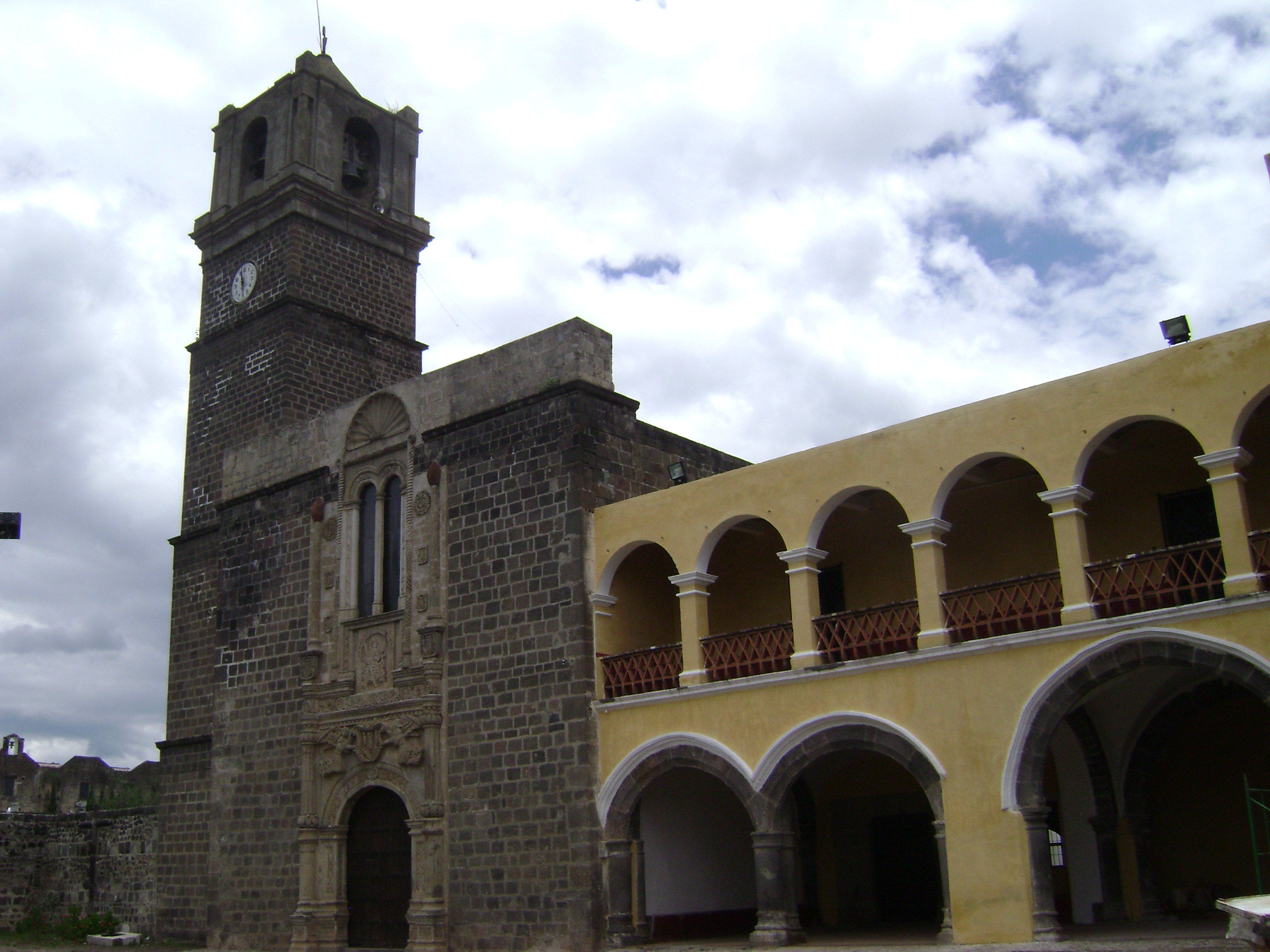 Convento edificado por los franciscanos en el siglo XVI, notable por su trabajo en cantera y sus capillas posas con un estilo único que puede confundirse entre el románico y el plateresco con un aire indígena asombroso. Patrimonio de la Humanidad desde 1994 dentro de los primeros conventos de las faldas del Popocatépetl. Ubicado en San Andrés Calpan, Puebla, México.